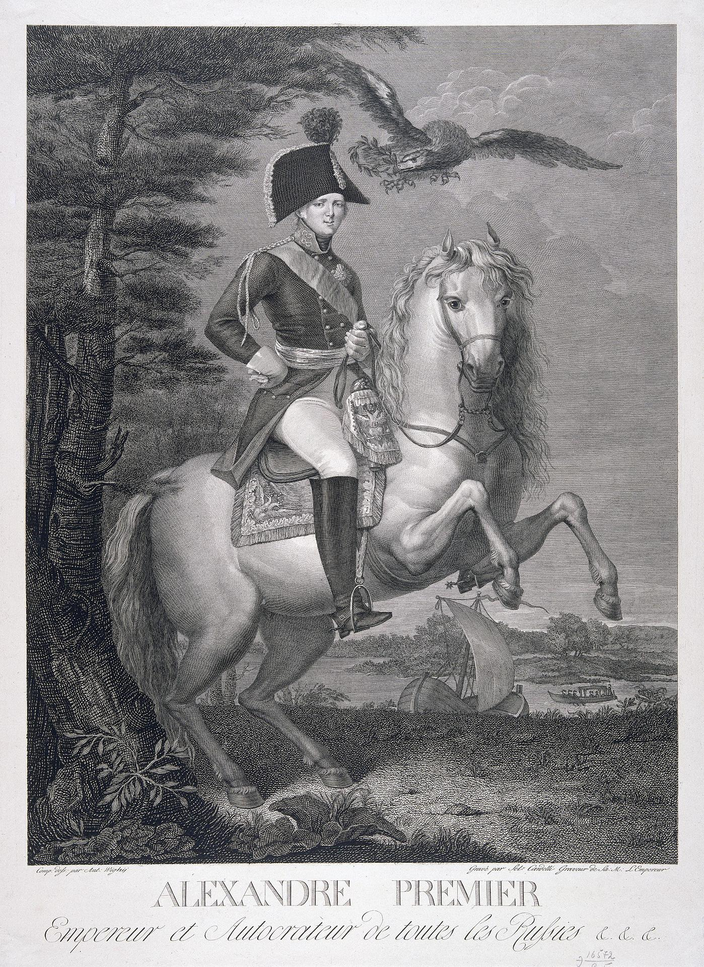 Изображен в генеральском мундире лейб-гвардии Преображенского полка с лентой и звездой ордена Андрея Первозванного